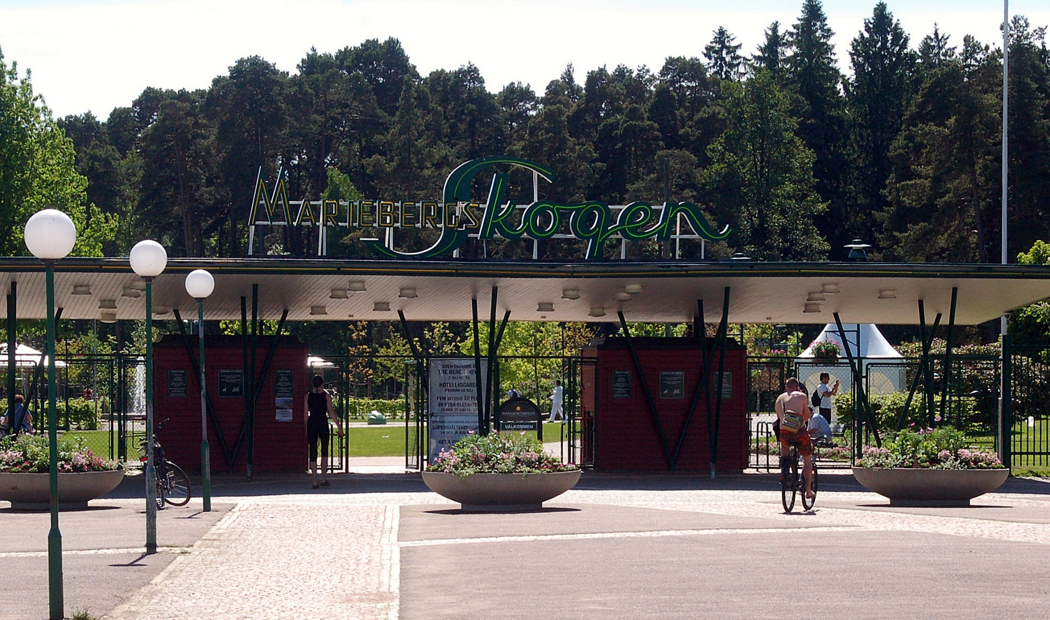 Huvudingång Mariebergsskogen Karlstad, Sweden. Entré ritad av Erik Örnenbring 1959